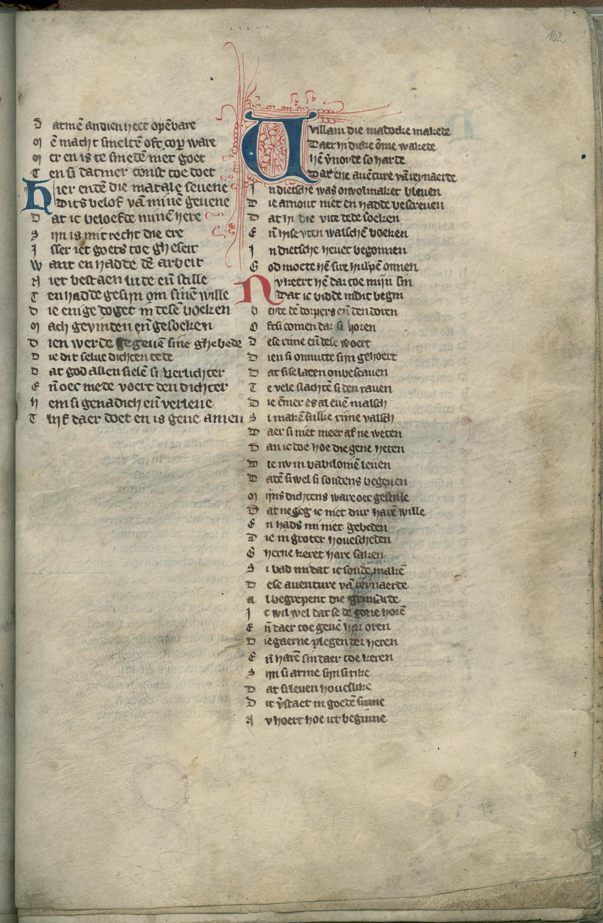 Dyckse manuscript 102 recto (Van den Vos Reynaerde - Willem die Madocke maecte) Münster NR 381